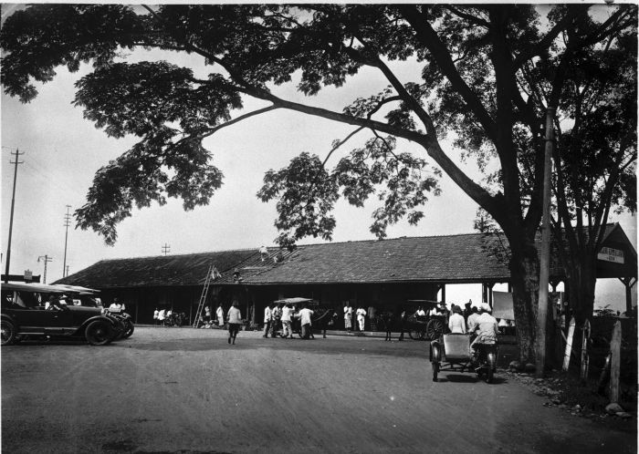 Foto. Het station Kotta Lama te Malang gelegen op 429 M. hoogte.